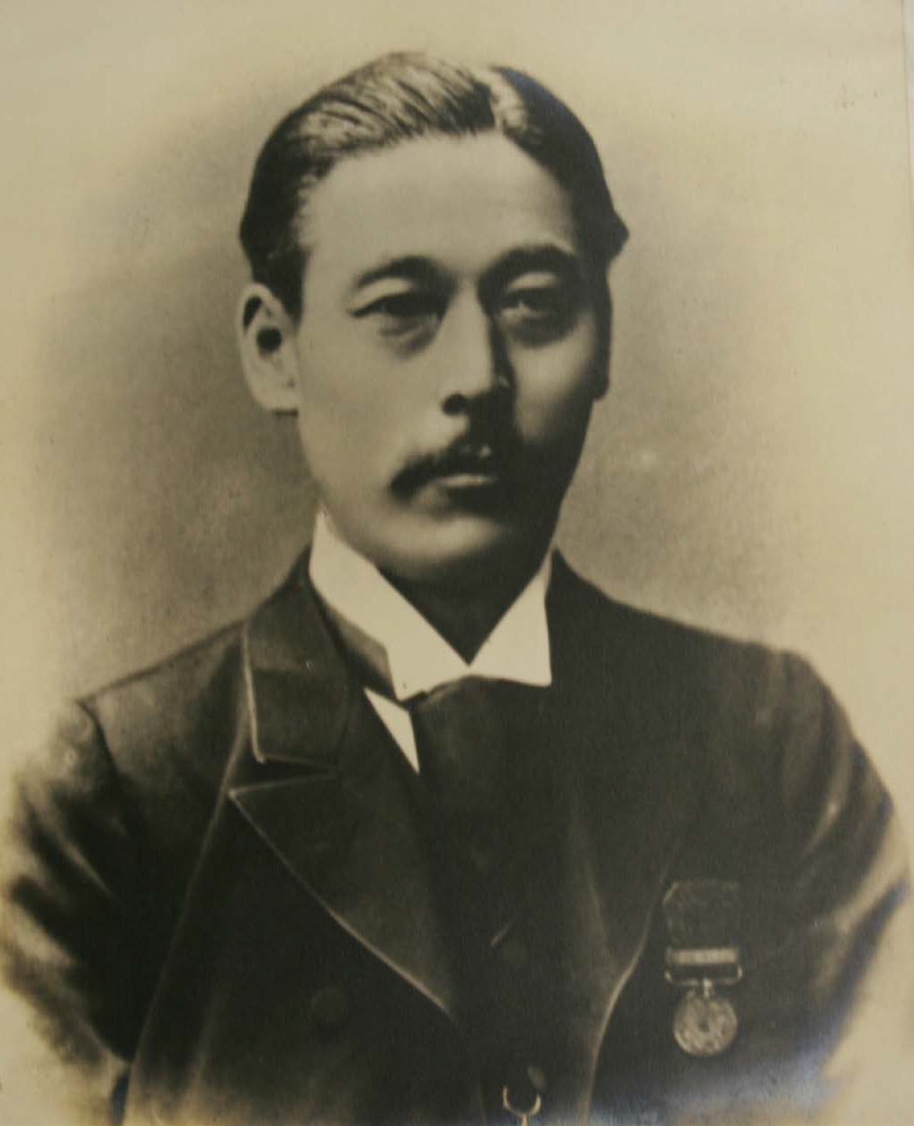 木村九蔵・競進社